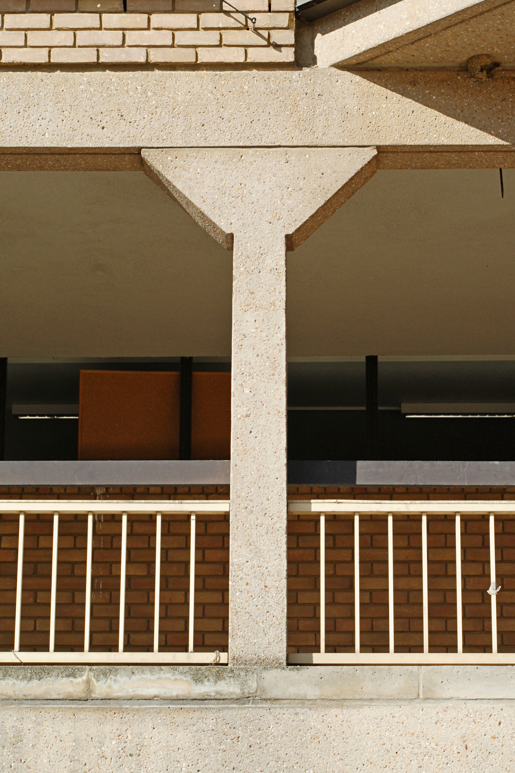 Belgique - Louvain-la-Neuve - Grand-Place - Collège Albert Descamps (faculté de théologie) This photo of immovable heritage has been taken in the Walloon Region